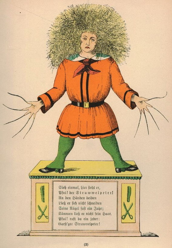 Der Struwwelpeter: Struwwelpeter